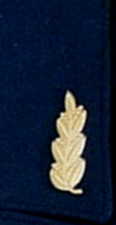 ОРПК901